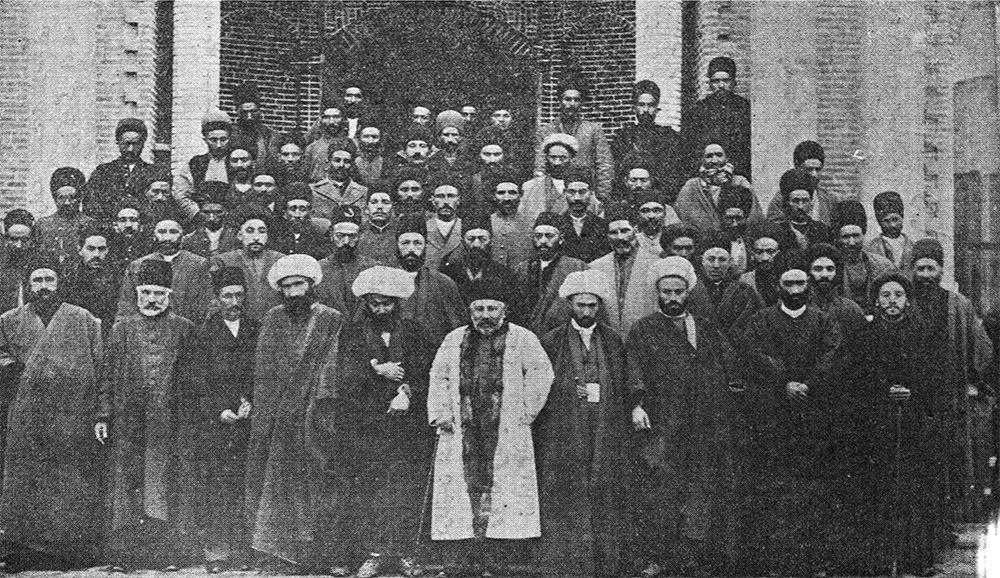 این افراد از پیشروان جنبش مشروطه تبریز و از نمایندگان انجمن و از نمایندگانی که برای دارالشوری برگزیده شده بودند می‌باشند. آنانکه در جلو ایستاده‌اند (از راست بچپ): میریعقوب یکی از (کارکنان انجمن)، حاجی غنی صراف، میرزا جواد ناطق (ناصح زاده)، حاجی نظام‌الدوله (سرانجمن)، شادروان شیخ سلیم، میرزا فضلعلی آقا، شرف‌الدوله، هدایت‌الله میرزا، حاجی محمد آقا حریری. از آنانکه در پشت سر ایستاده‌اند. آنکه در پشت سر حاجی نظام‌الدوله ایستاده حاجی مهدی آقا کوزه‌کنانیست، آنسوتر حاجی ملک‌التجار است، آنسوتر مرتضویست، آنسوتر حاجی معین‌الرعایاست.